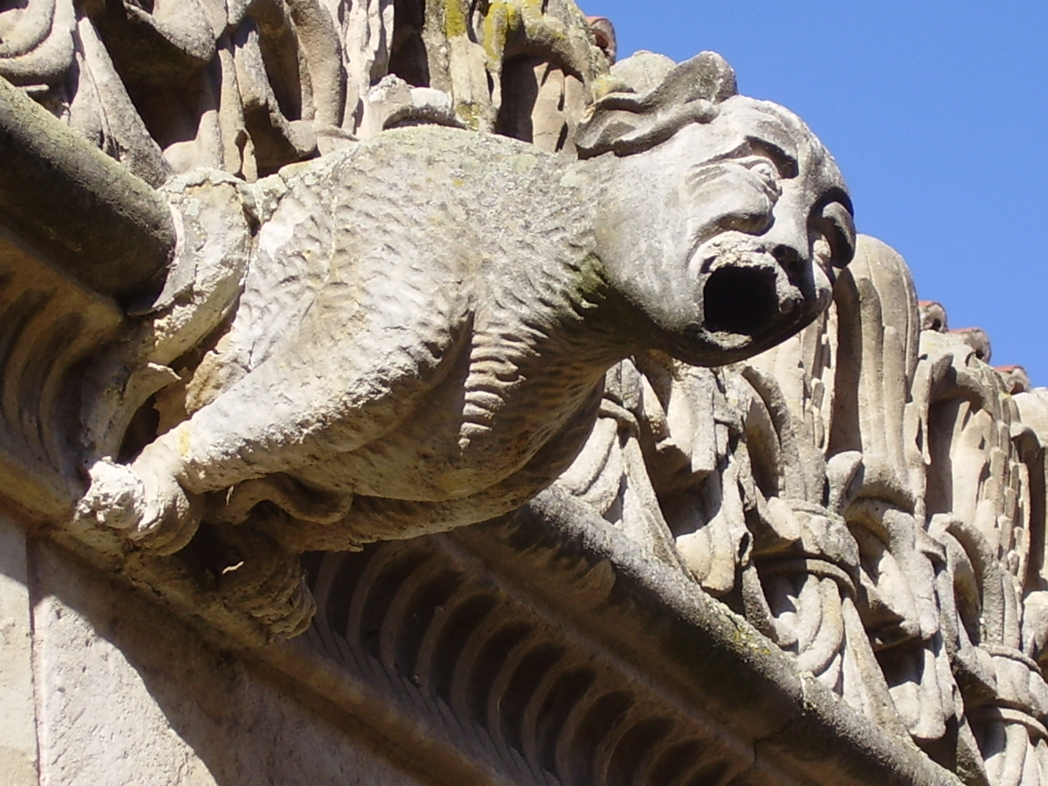 Gárgola de CASA DE LAS CONCHAS ( SALAMANCA )